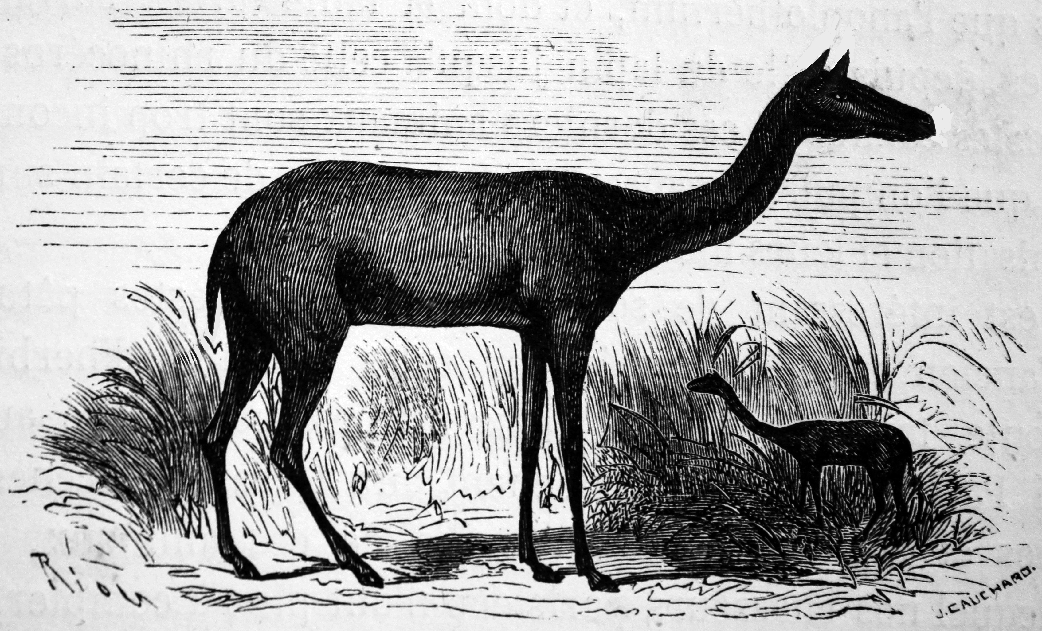 "Xiphodon gracile". Ilustraciones de la obra : La Terre avant le déluge / par Louis Figuier ; ouvrage contenant 25 vues idéales de paysages de l'Ancien Monde, dessinées par Riou.- Paris : Librairie de L. Hachette, 1863. - 2e éd.